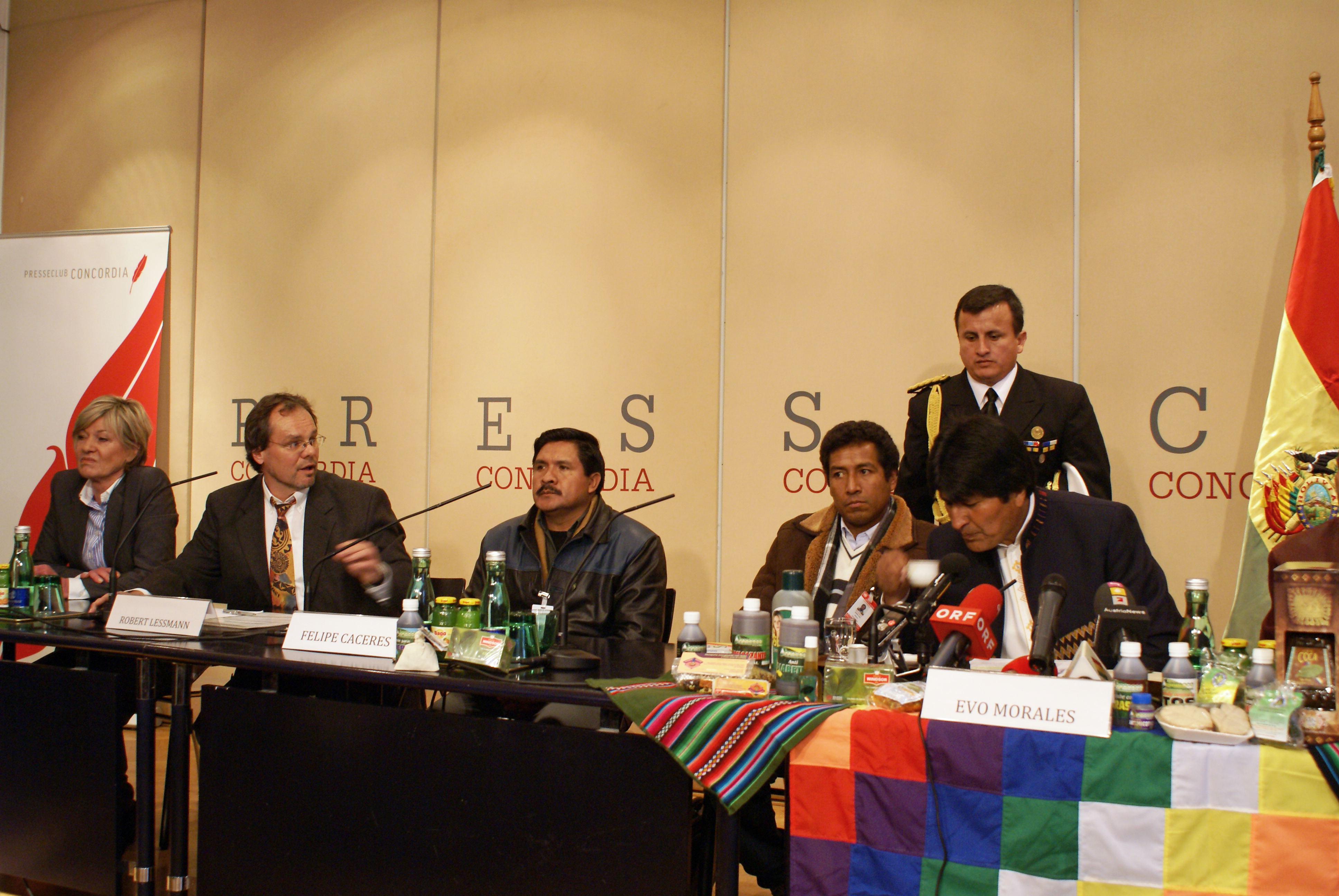 Diskussionsveranstaltung im Presseclub Concordia, Wien. Auf dem Bild u.a. Robert Lessmann (2. von links) und Evo Morales (rechts)